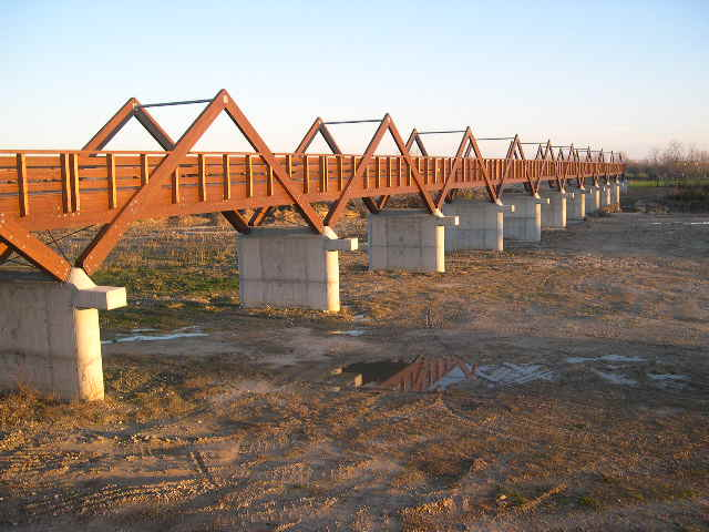 Autore: Lucio De Marcellis Descrizione: Ponte in legno lamellare alla foce del fiume Tordino (Teramo), che alla data 2006 è considerato il più lungo al mondo del suo genere Licenza